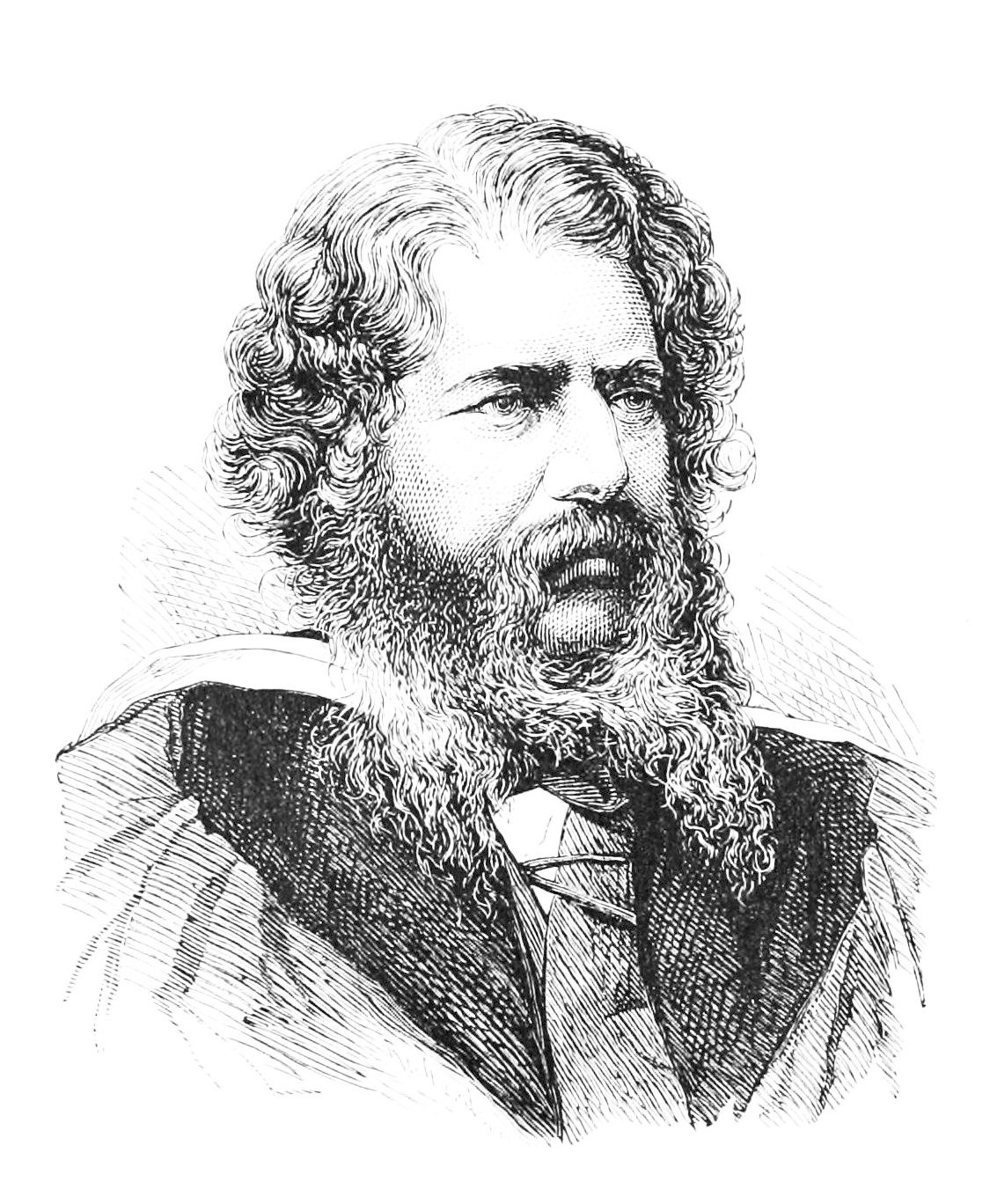 W J Macquorn Rankine